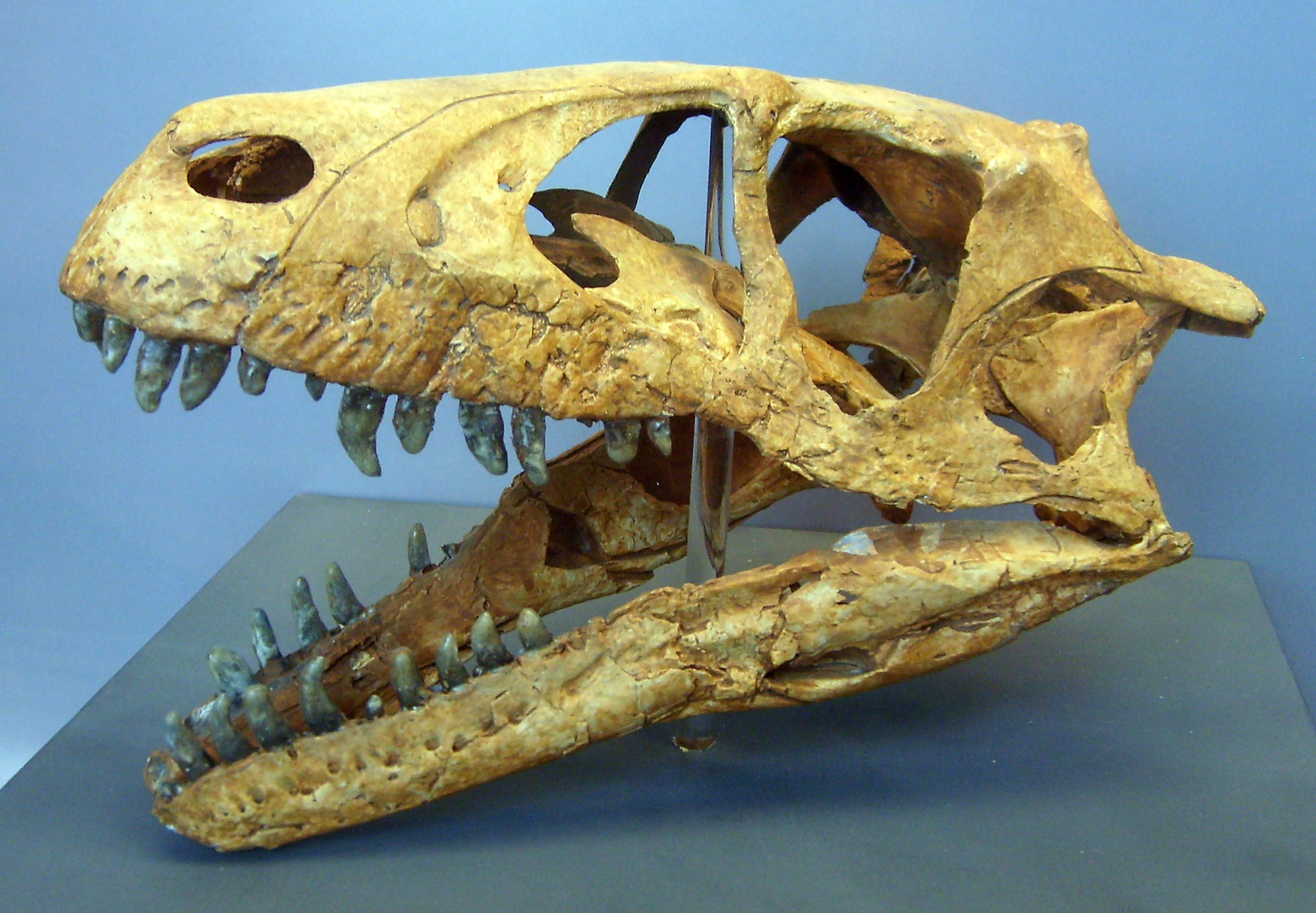 Dromaeosaurus skull cast, Geological museum, Copenhagen.